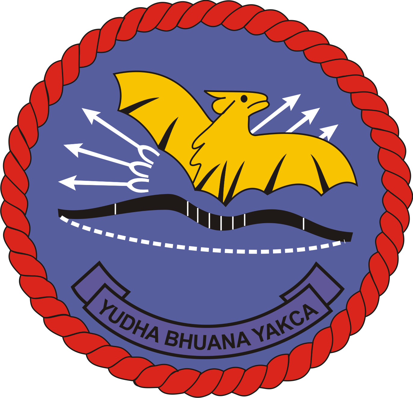 Arti Logo Yonarhanud 3/YBY : 1. Bentuk Lingkaran diartikan pertahanan udara kesegala arah yang tangguh. 2. Lilitan Tali Berjumlah 45 diartikan pengamanan terhadap jalannya revolusi 17-8-1945. 3. Kalelawar / Kalong diartikan penguasaan terhadap angkasa dengan waspada serta siap siaga menghadapi segala kemungkinan dan mempunyai indera keenam, dimana dalam cuaca gelap dapat mengetahui suatu sasaran atau benda, sama halnya dengan radar Super Fledermause yaitu nama alat kendali tembak meriam 40 mm L-70, merupakan senjata pokok Yonarhanudri-3 yang dapat menangkap sasaran walaupun dalam cuaca gelap, sehingga sasaran dapat diserang dan dihancurkan sebelum sasaran tiba di daerah yang dipertahankan tepat pada waktunya. 4. Lilitan tali busur berjumlah 23 dan tulang-tulang pada sayap Kelelawar berjumlah 6 diartikan tanggal dan bulan kelahiran Yonarhanudri-3. 5. Lilitan tali pada busur panah berjumlah 7 diartikan sebagai ” Sapta Marga” yang menjadi pedoman prajurit Yonarhanudri-3. 6. Enam anak panah yang terpencar ke udara diartikan Yonarhanudri-3 dilahirkan dan bernaung dibawah kodam VI / Siliwangi (Sekarang Kodam III / Siliwangi). 7. Dua bintang segi lima yang mengapit Motto ”YUDHA BHUANA YAKCA” diartikan sebagai Resimen Arhanud-2 sebagai induk kesatuan (yang telah dibekukan tahun 1977). 8. Bintang segi lima diartikan Pancasila sebagai falsafah hidup dan dasar Negara Kesatuan Republik Indonesia. 9. Seloka ” YUDHA BHUANA YAKSA ” diartikan : a. YUDHA = Perang. b. BHUANA = Bumi angkasa. c. YAKSA = Keunggulan / kemegahan. Arti bebasnya adalah keunggulan dan kemegahan dalam perang dan sebagai kekuatan yang ampuh dalam pertahanan udara khususnya.